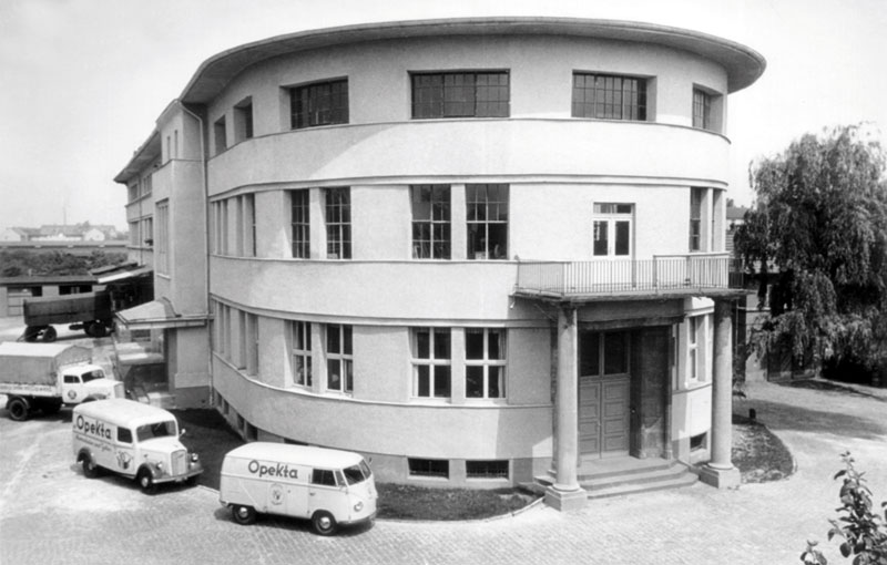 Das Hauptgebäude des Opekta-Geländes, Xantener Straße 99 in Köln